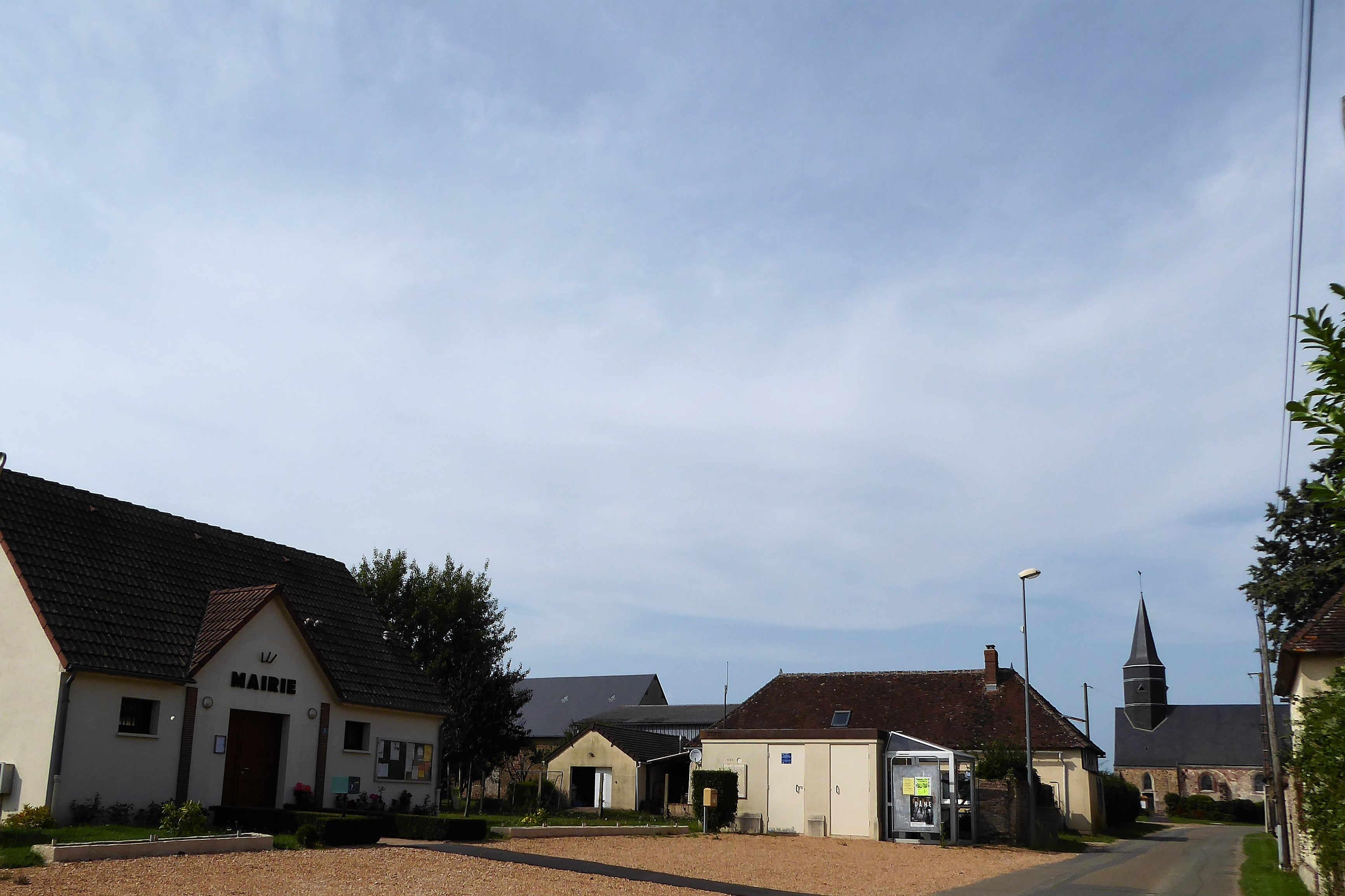 mairie et église Notre-Dame, Les Châtelliers-Notre-Dame, Eure-et-Loir (France).